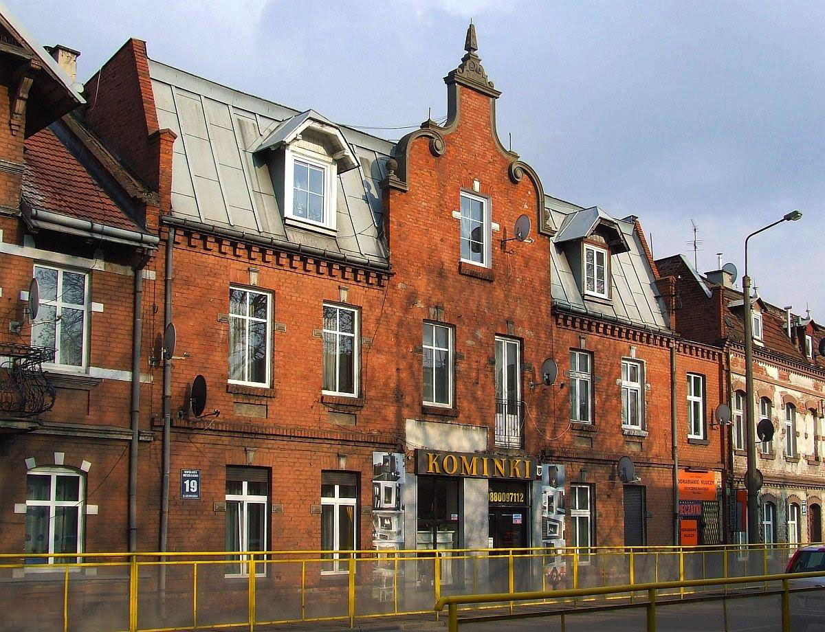 Dom pod nr 19.